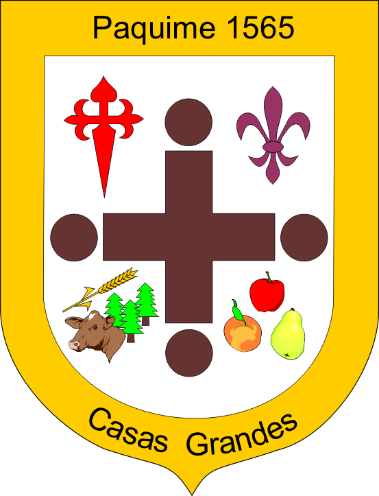 Escudo del municipio de Casas Grandes, Chihuahua, México.